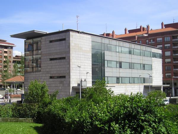 Galdakaoko Kultur etxea.